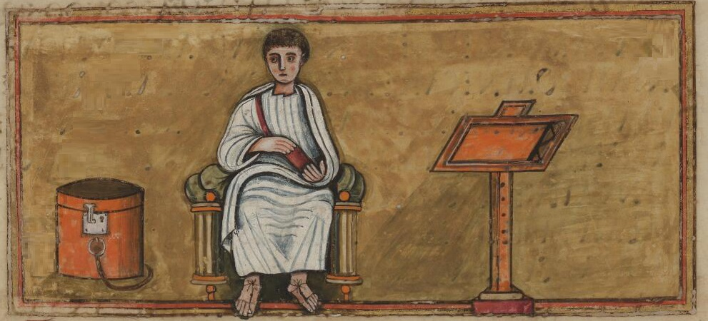 Illustration extraite du Folio 14 (recto) du Vergilius Romanus .